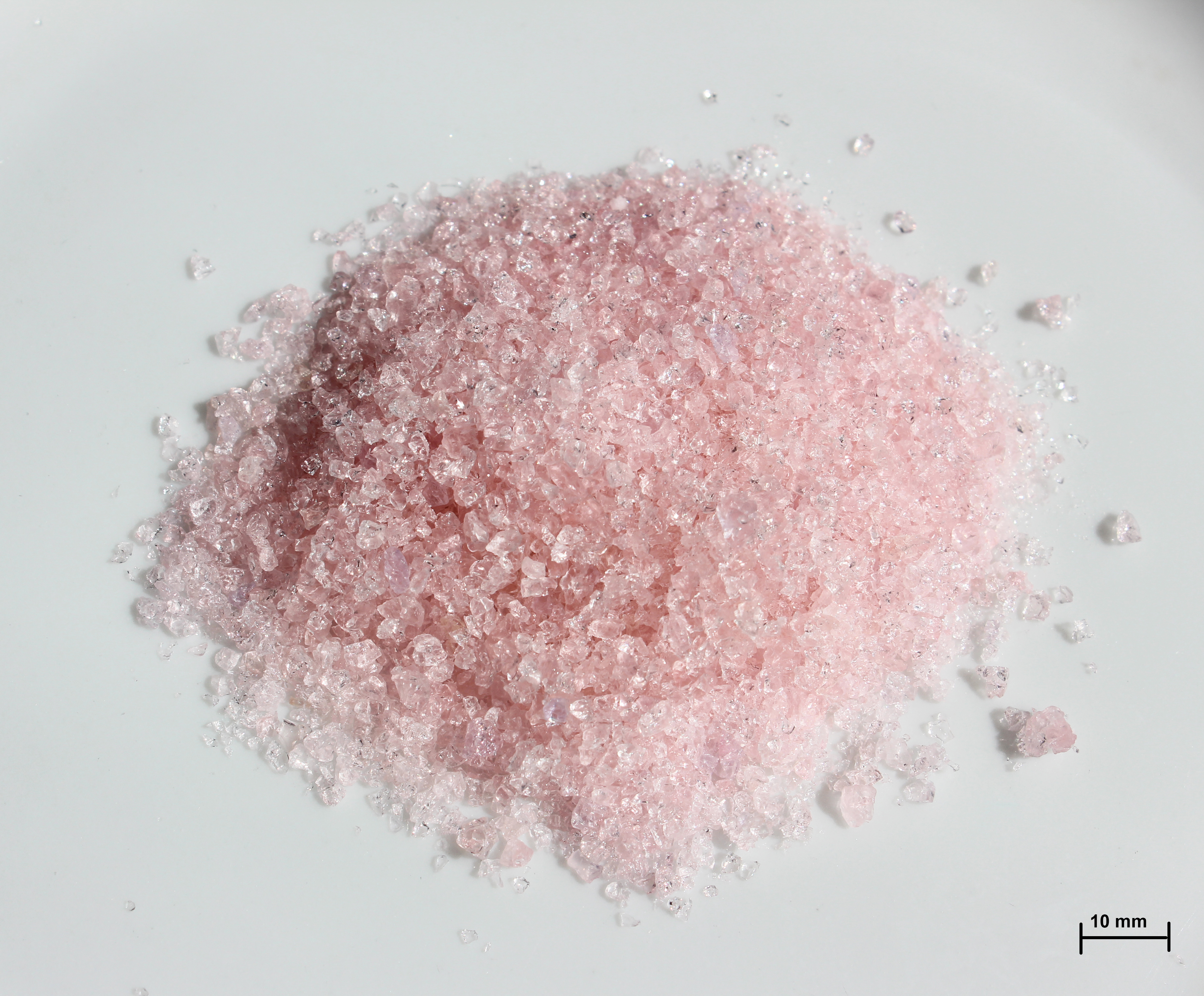 Blaugel fecht